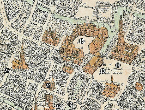 De Sint-Janskerk (24) op het Sint-Jansplein te Brugge - West-Vlaanderen - België